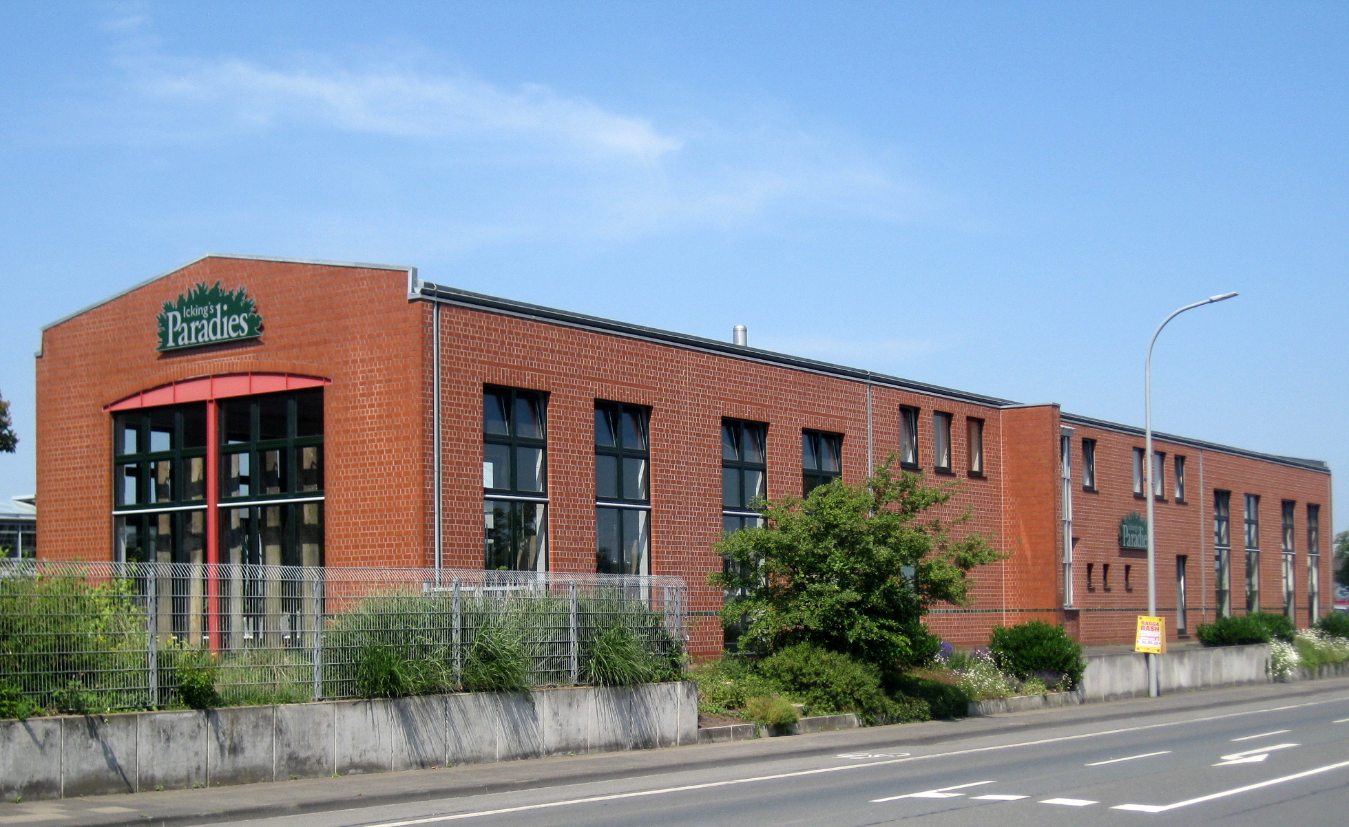 Neues Gewerbe auf der Konversionsfläche der ehemailgen Stuhlfabrick Bücking, Auszeichnung der Landesregierung NRW als vorbildliche Fläche für Gewerbe und Stadtökologie 1994